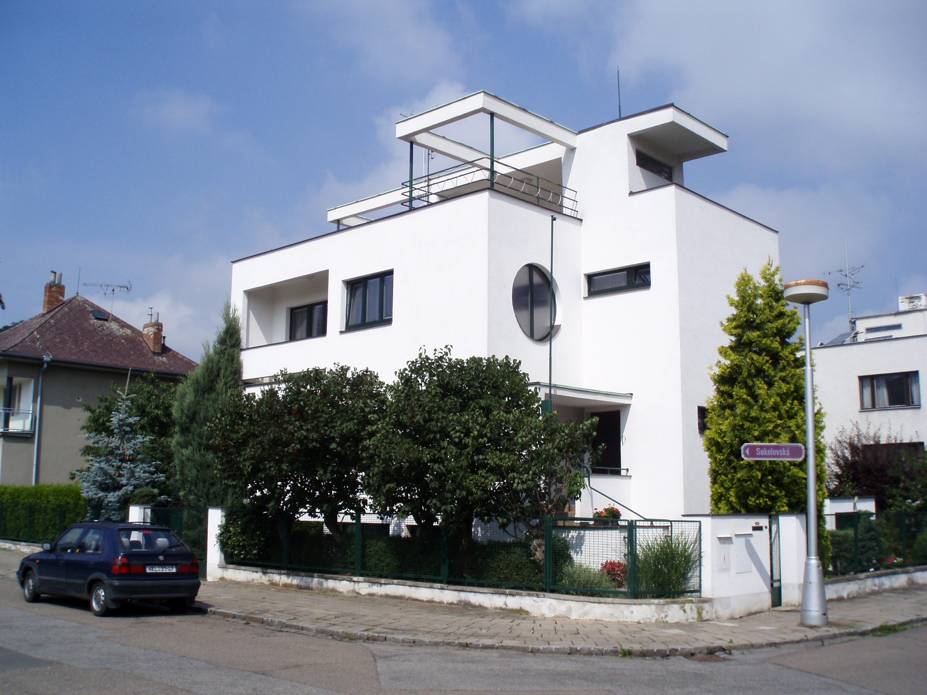 Dům s funkcionalistickými prvky od architekta Karla Horáka